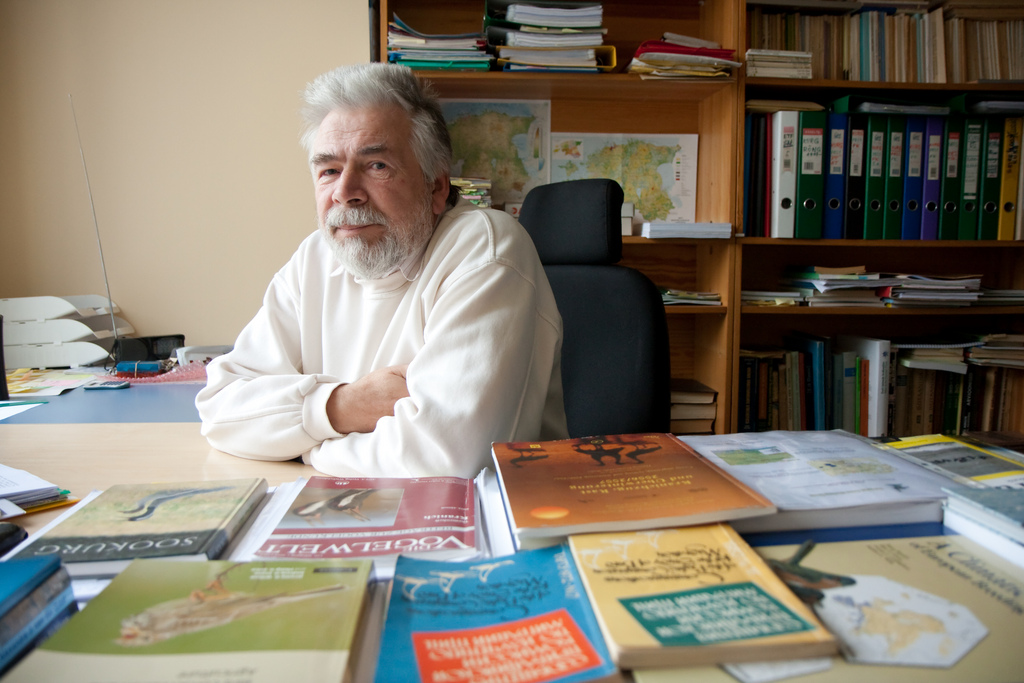 Ornitoloog Aivar Leito Eesti Maaülikoolis.